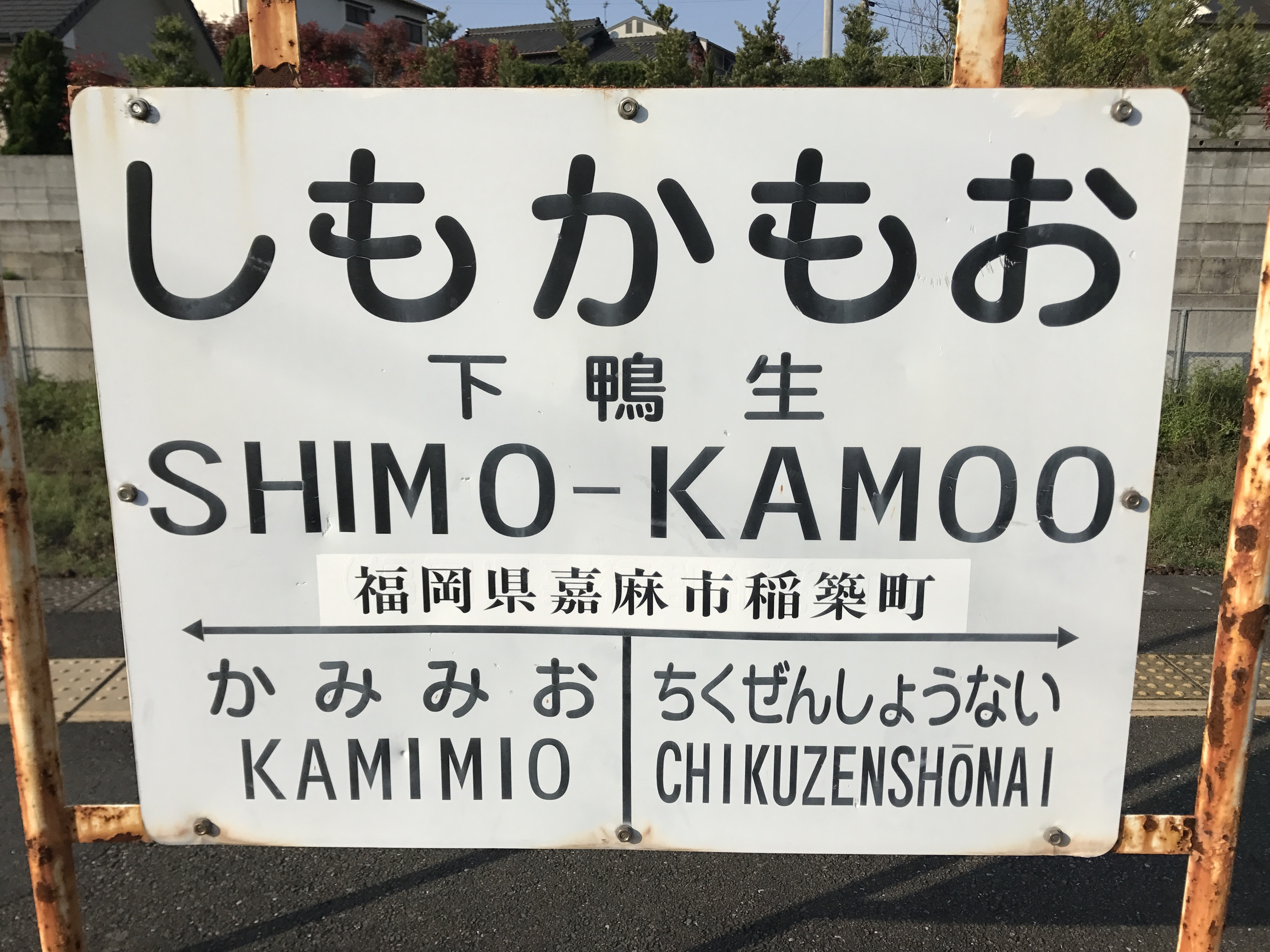 下鴨生駅の駅名標